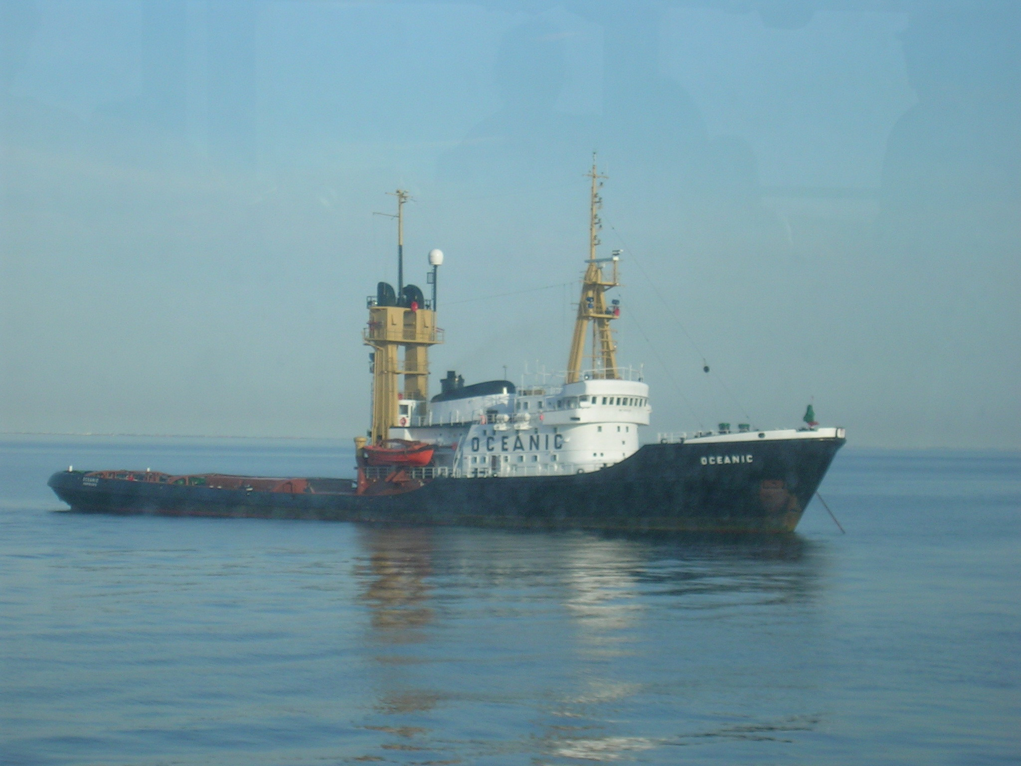 Hochseeschlepper Oceanic IMO Number: 6901490 MMSI Number: 211233440 Callsign: DIAL Length: 87 m Beam: 14 m